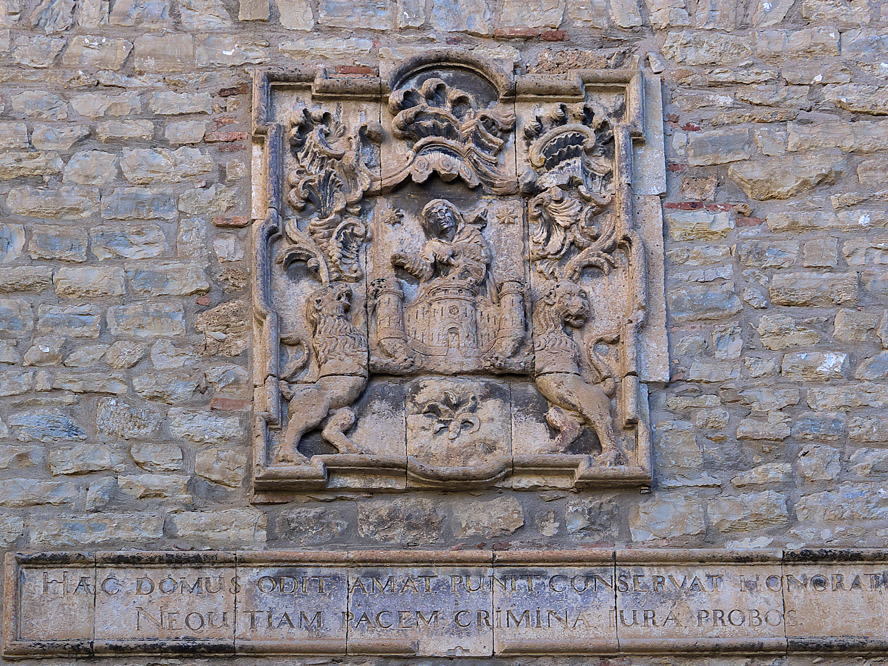 Escudo de Cantavieja.